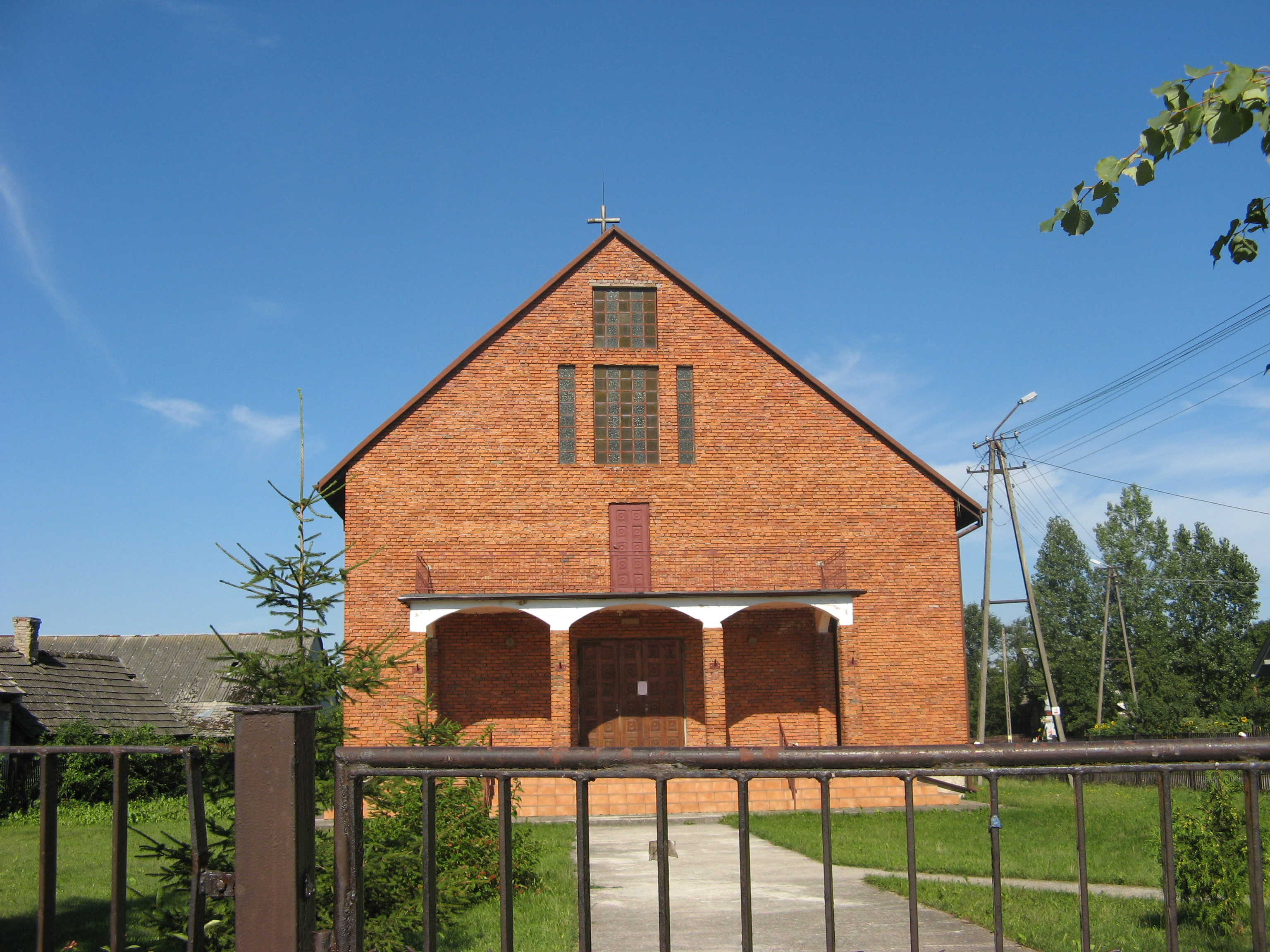 Kościół pod wezwaniem św. Maksymiliana Kolbe